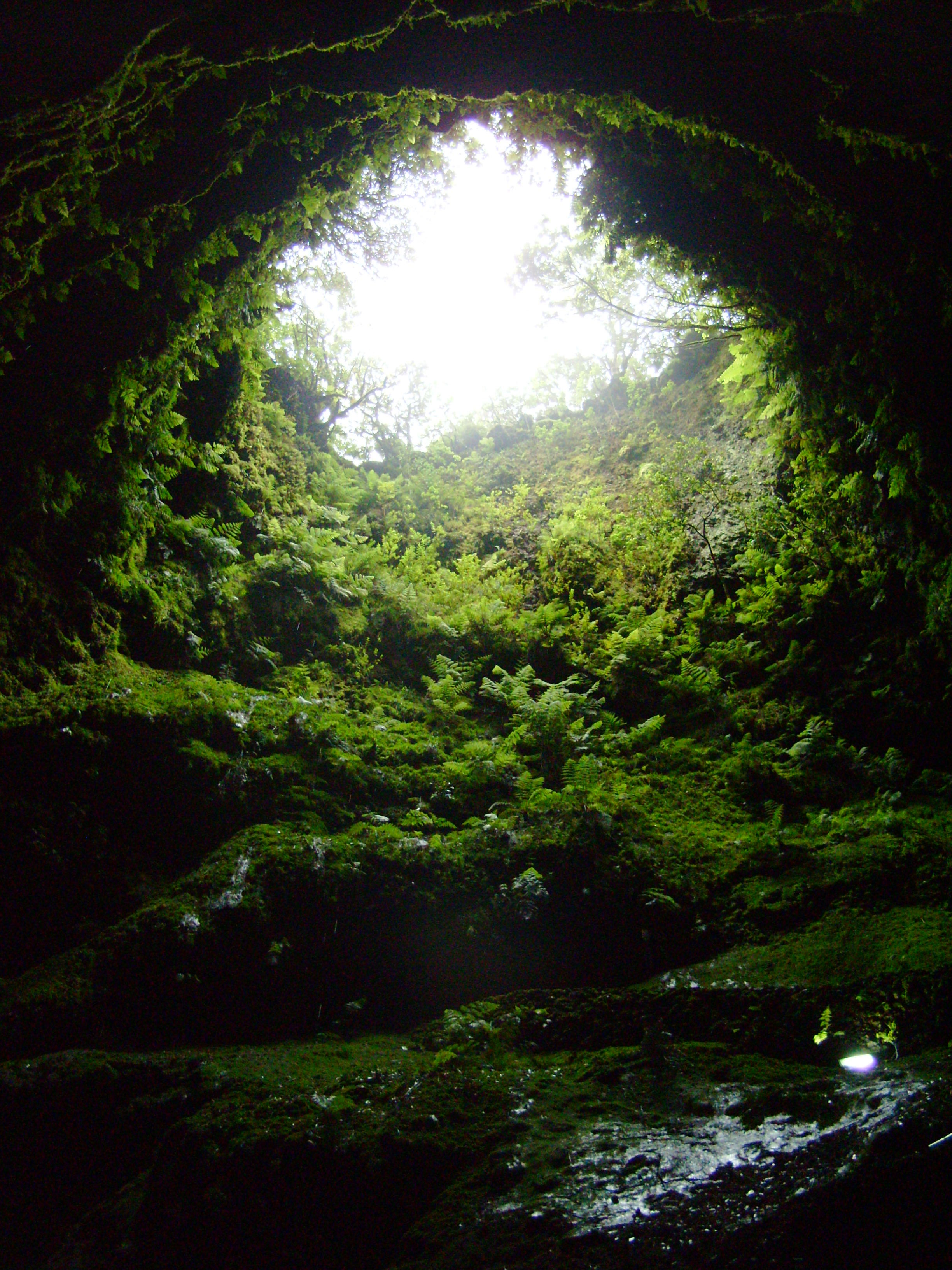 Algar do Carvão, ilha Terceira, Açores.